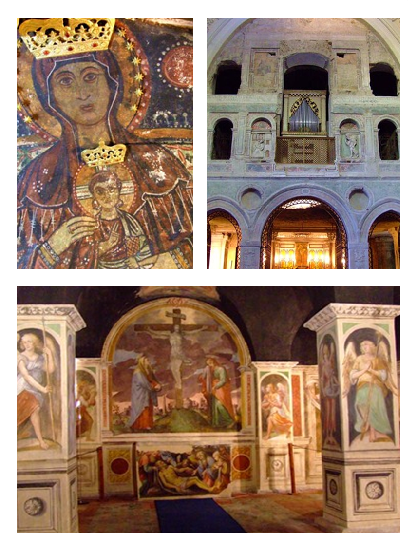 Icona della Madonna dei Miracoli, grotta ed affreschi della cappella della Crocifissione